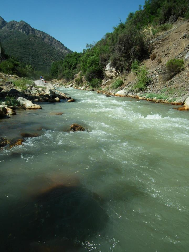 El Rio San Francisco es uno de los dos rios que forman el Rio Mapocho.